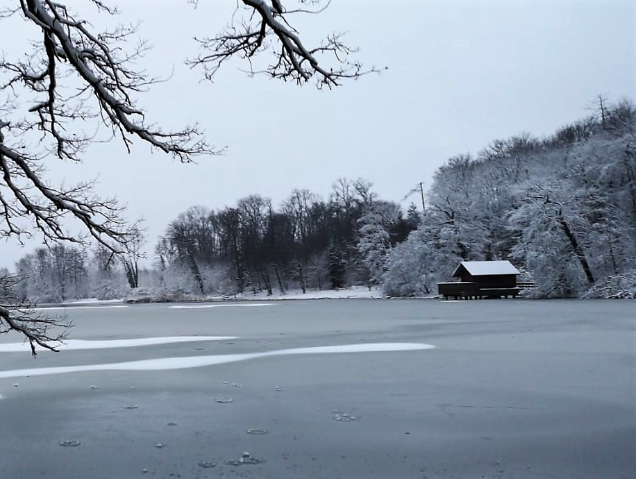 Pro Natura Hütte Thurgau neben dem Grossweiher